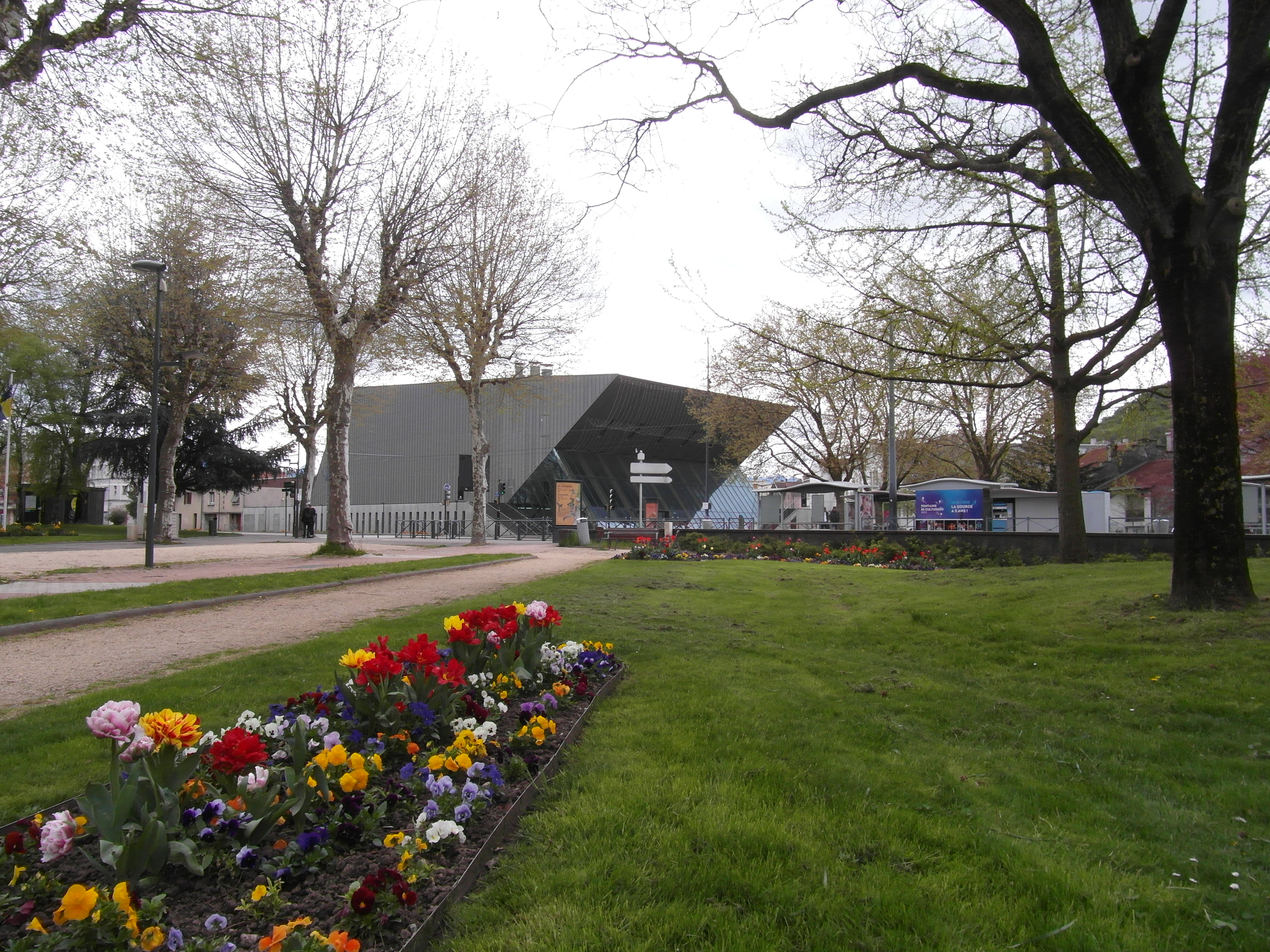 Fontaine Park